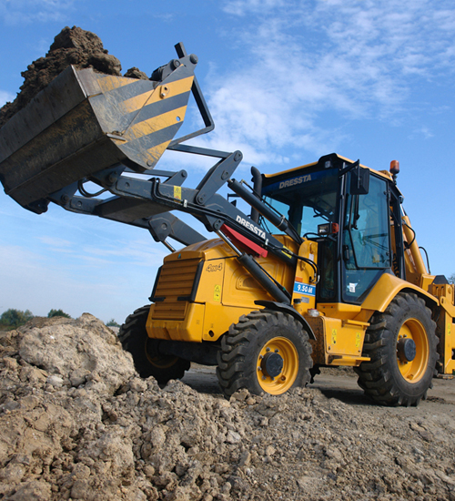 Koparko-ładowarka 9.50M marki DRESSTA